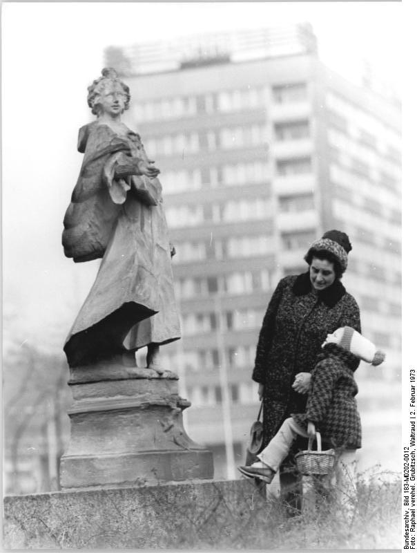 Leipzig, Sachsenplatz, Skulptur ADN-ZB Raphael 2-2-1973 Leipzig: Permoser-Plastiken auf dem Sachsenplatz-Wertvolle Figuren aus der Schule Permosers, der als Bildhauer mit dem Figurenschmuck des Zwingers eine Meisterleistung der dekorativen Plastik seiner Zeit schuf, bereichern seit einigen Tagen das Zentrum der Messestadt. Die Arbeiten, die aus dem Park von Prödel stammen -er mußte vor zwei Jahren der Braunkohle weichen- fanden nach gründlicher Restaurierung auf dem Sachsenplatz einen neuen Standpunkt.